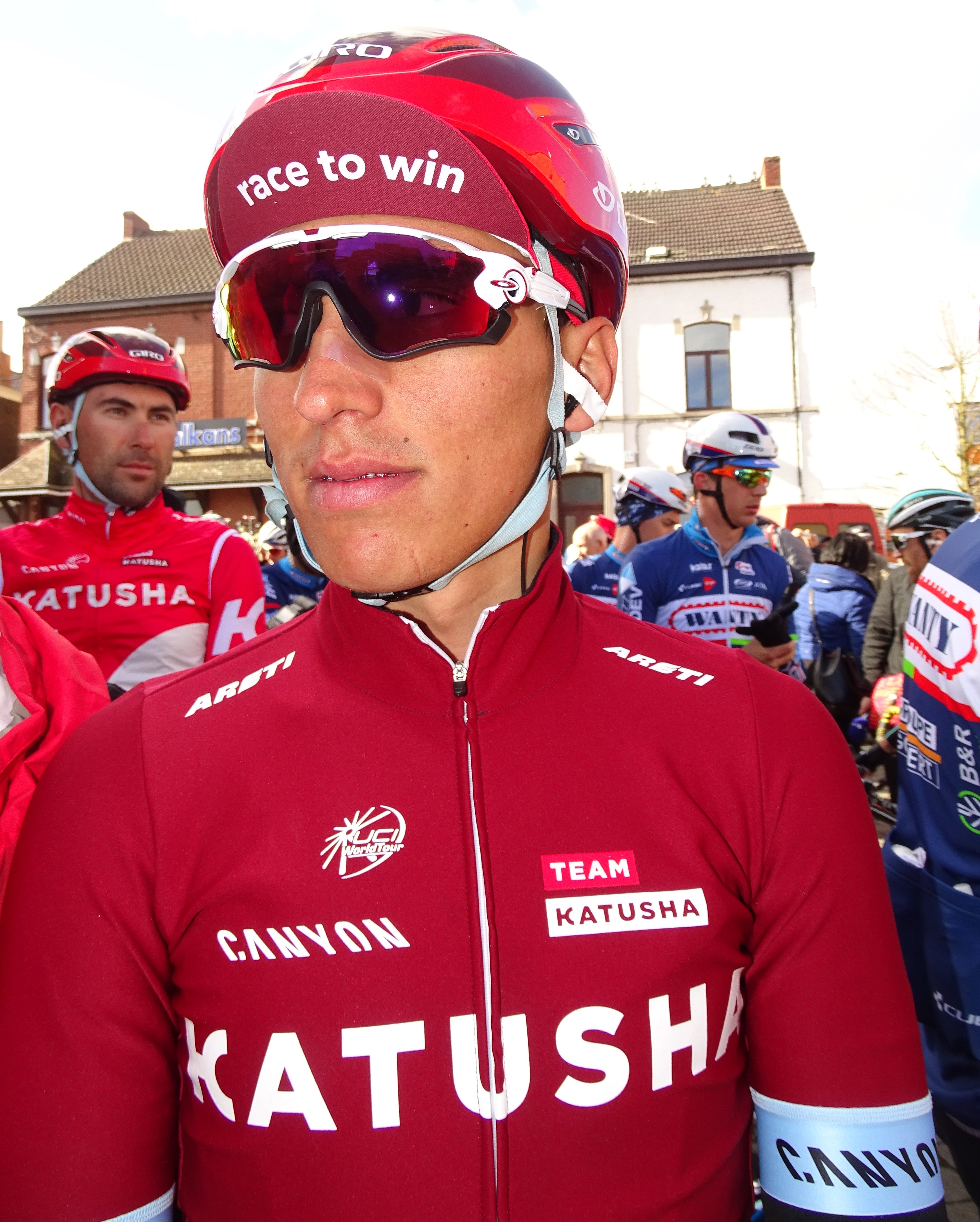 Reportage réalisé le mercredi 2 mars à l'occasion du départ du Samyn des Dames 2016 et du Samyn 2016 à Quaregnon, Belgique.